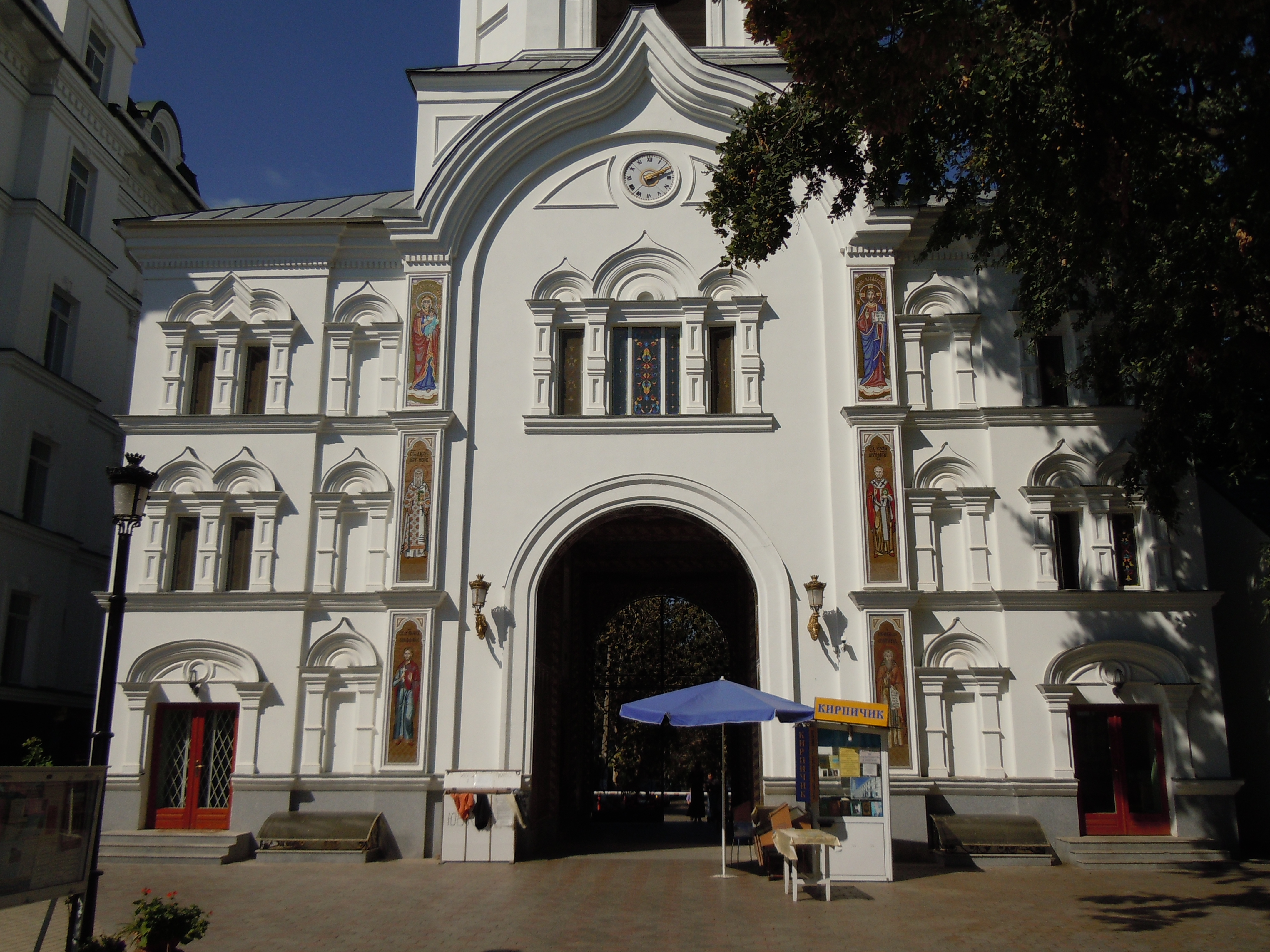 Свято-Успенський монастир в Одесі. Брама монастиря.